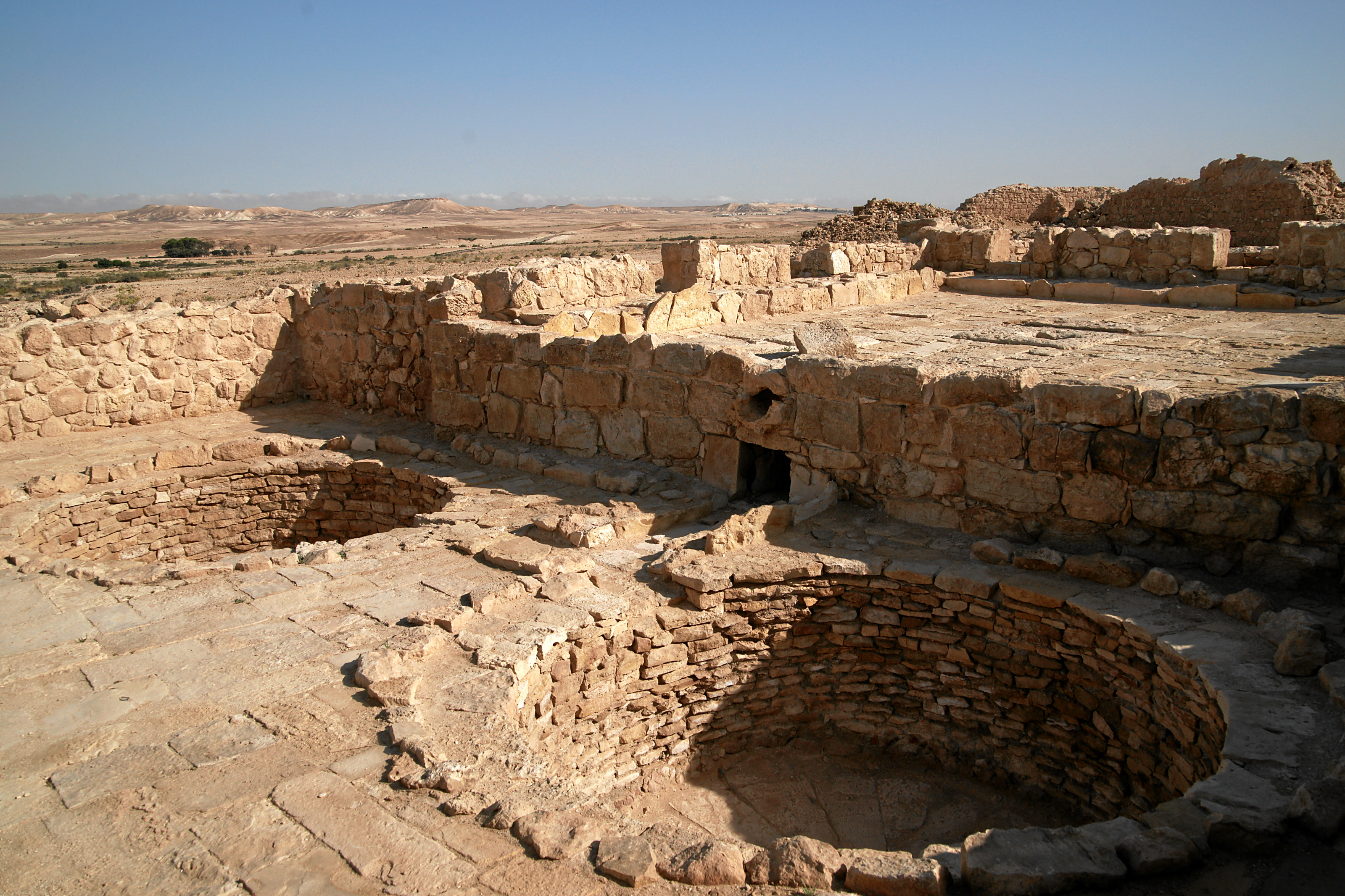 Shivta: Weinkelter